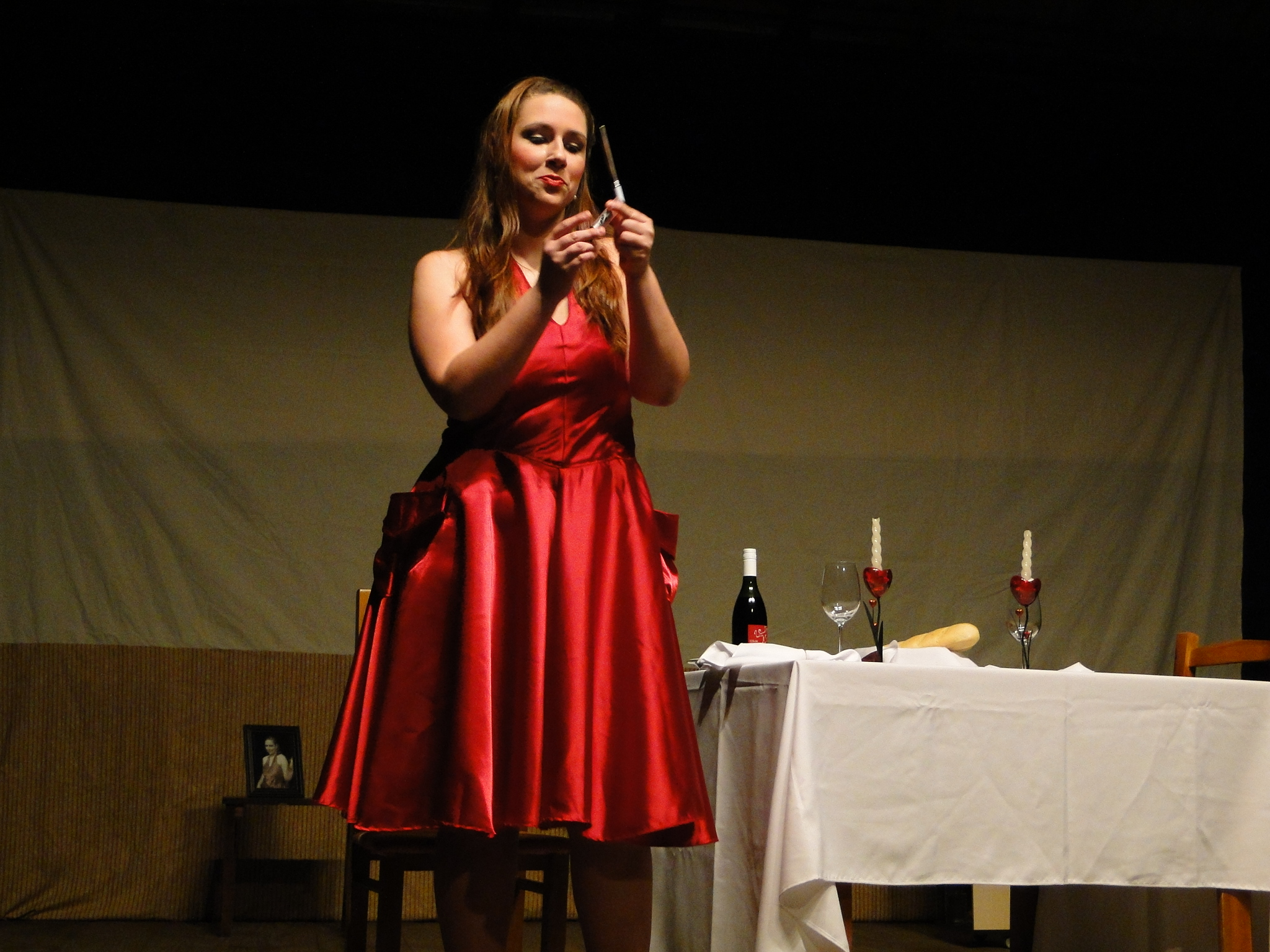 Peça Jantar de Graça, apresentada no Espaço Cultural Victorio Faccin no dia 6 de agosto de 2011